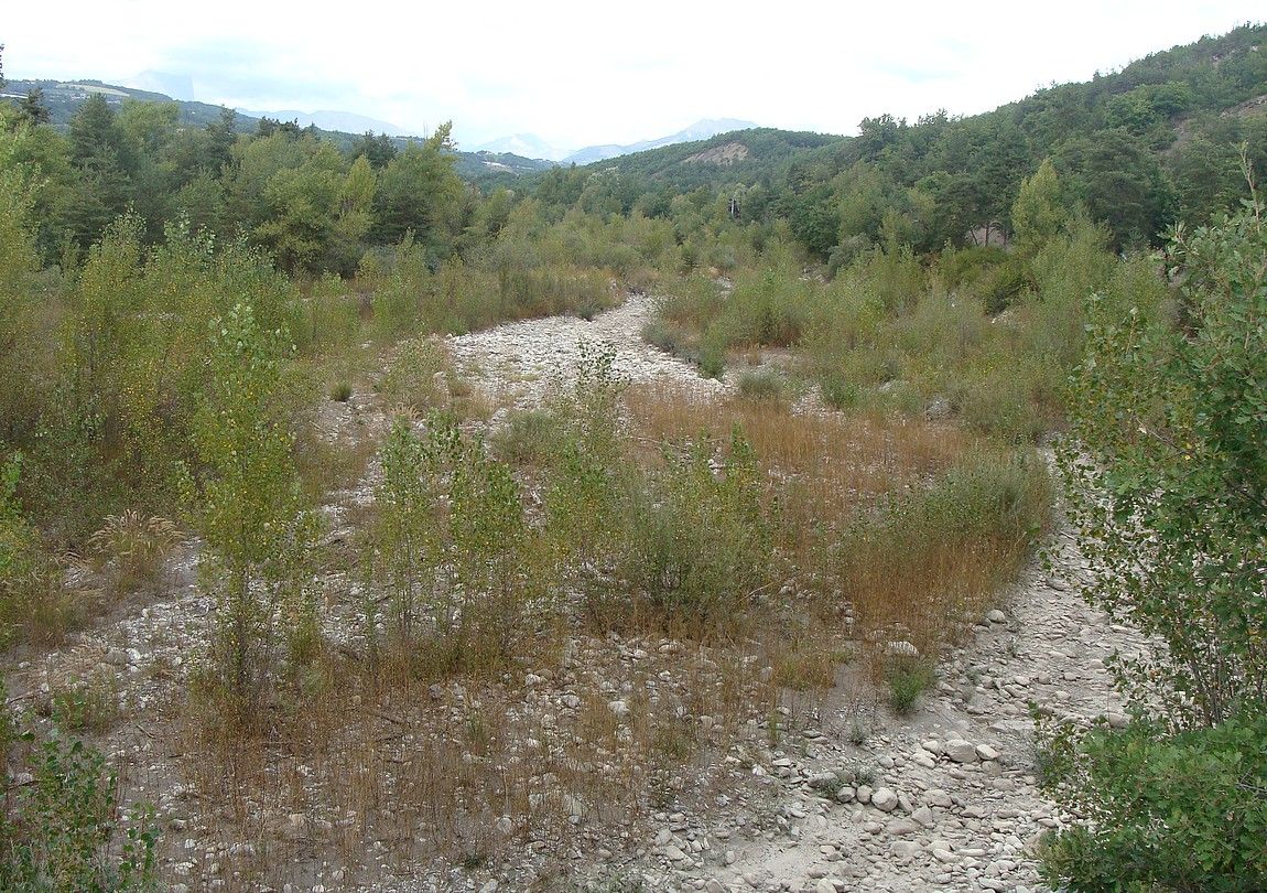 Le (lit du) torrent de Baudon entre Fouillouse et Tallard (fin d'été, il est à sec). Photo prise en direction de l'amont depuis le pont de la D 119.